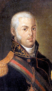 Dom João VI e Dona Carlota Joaquina, reis de Portugal (óleo do século XIX)